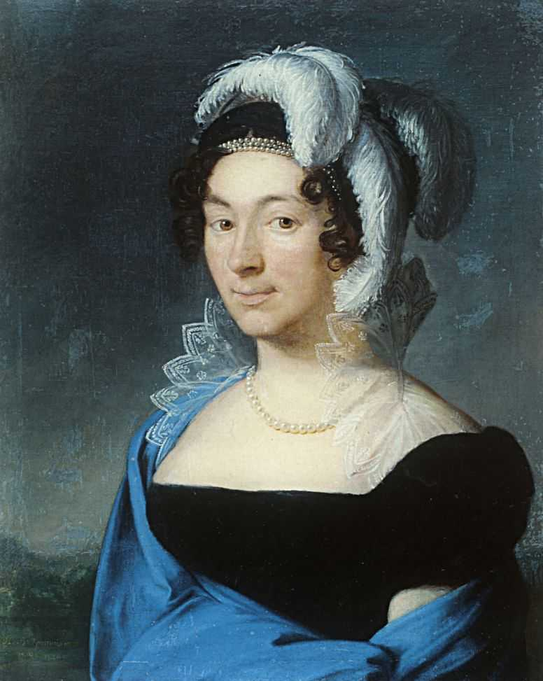 Портрет дамы. Елена Григорьевна Пушкина, ур. Воейкова (1778—1833). Копия с её портрета находится в Пушкинском Доме.